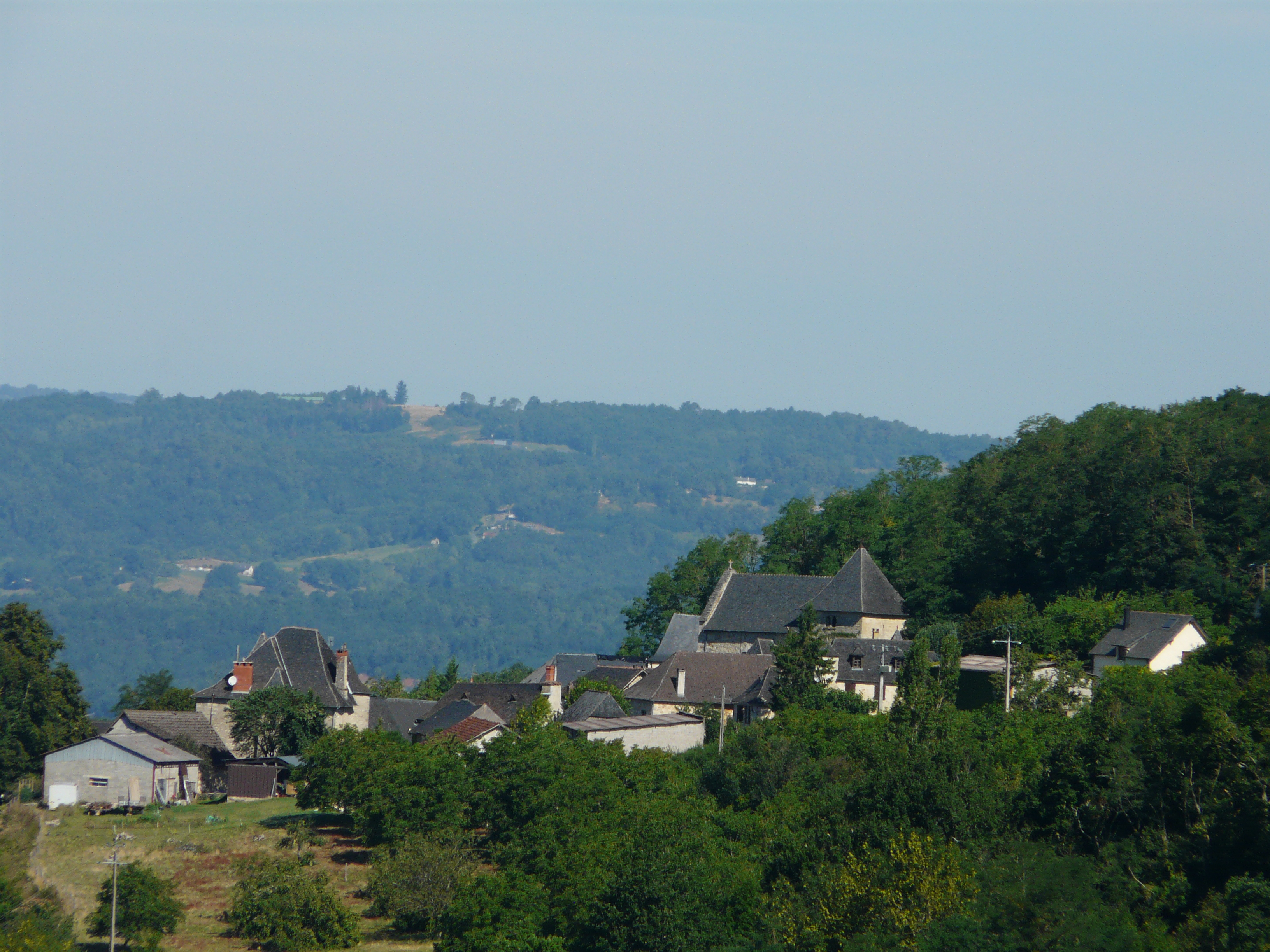 Le village de Grèzes, Dordogne, France.